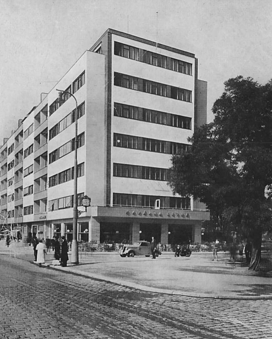 Historische Aufnahme des zwischen 1936 und 1938 entstandenen Molochov-Blocks in Prag, an dessen Errichtung die Brüder Karl und Otto Kohn maßgeblich beteiligt waren.